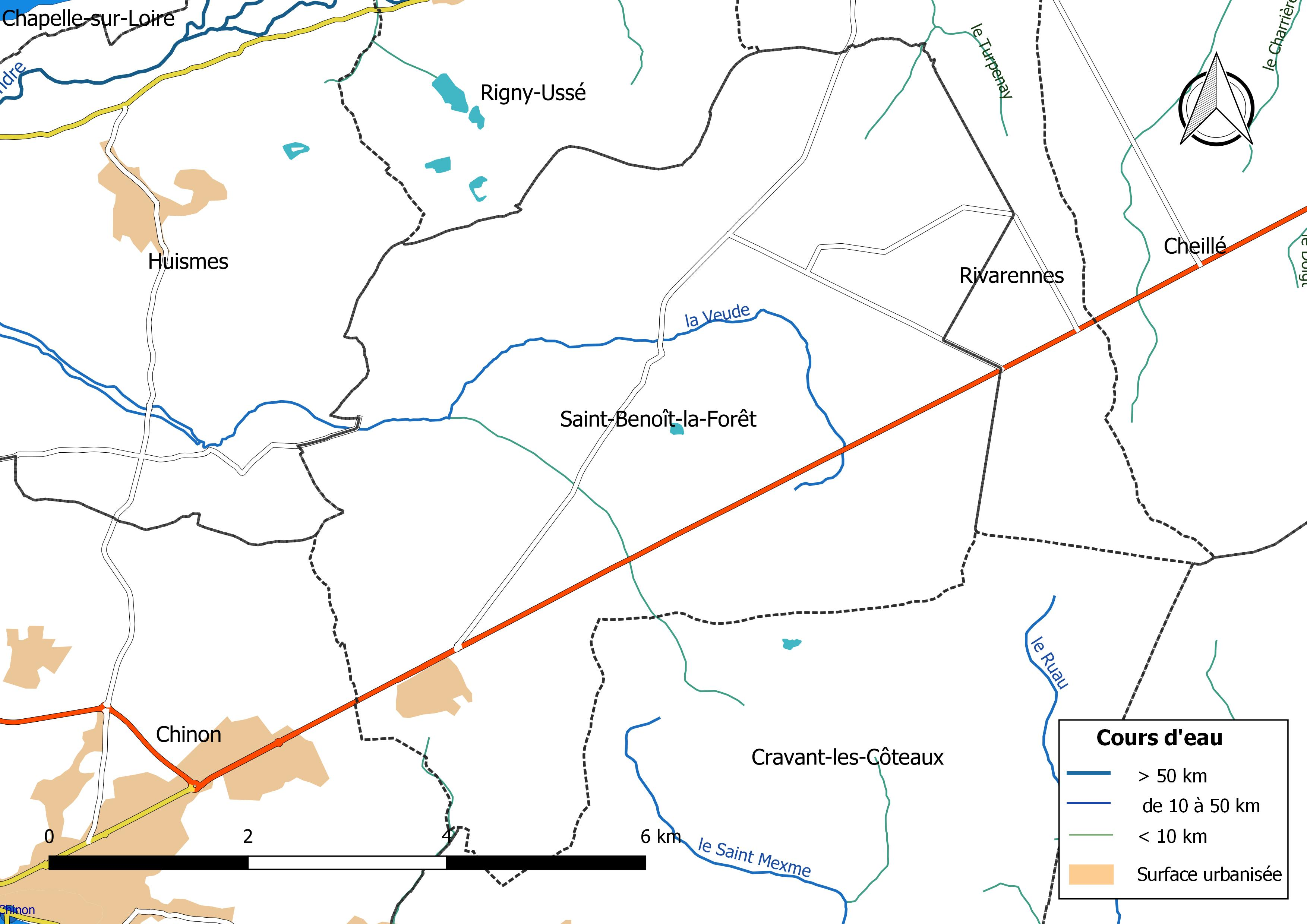 Carte du réseau hydrographique de la commune de Saint-Benoît-la-Forêt (France).